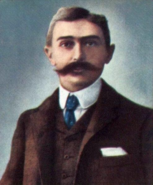 Pierre de Coubertin en 1912 - Campioni dello Sport 1968-1969, n°386